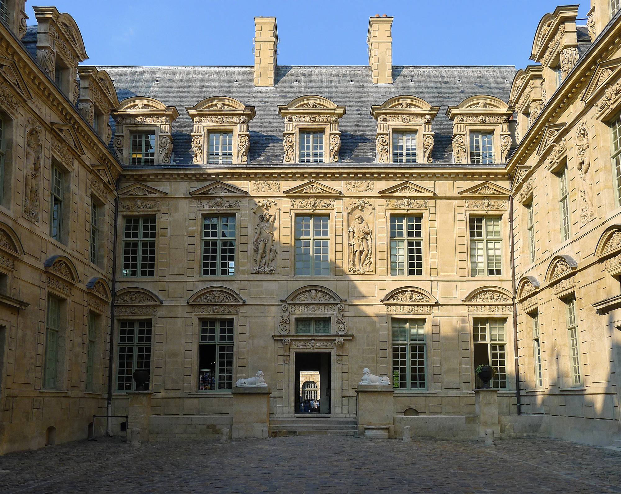 Hôtel de Sully (Classé) - Paris IV .